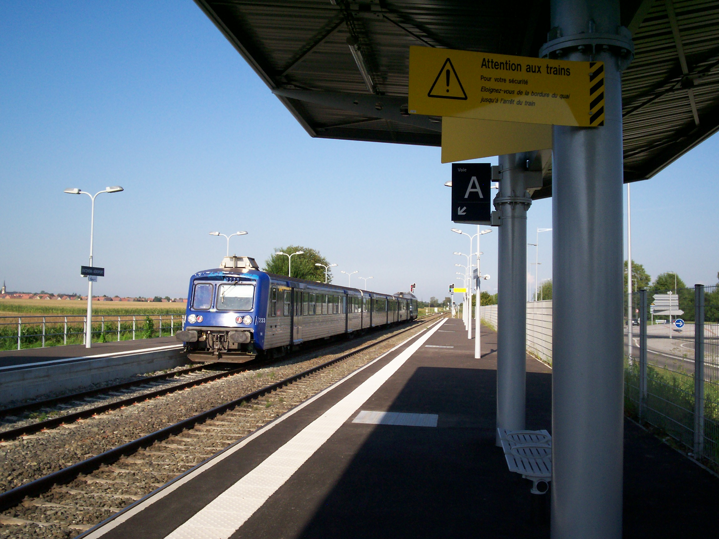 TER Alsace